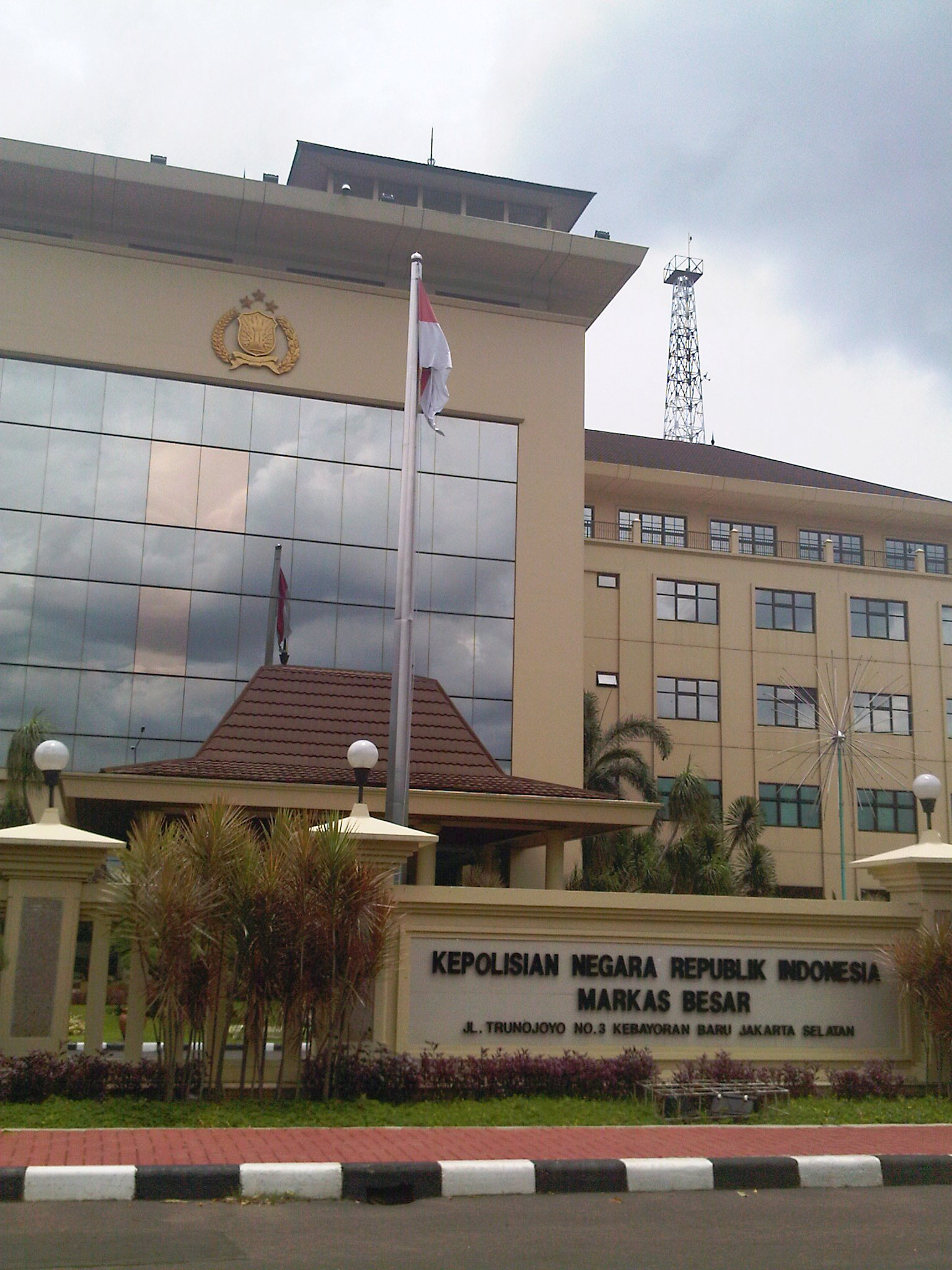 Mabes Polri, Indonesia Police HQ, Trunojoyo